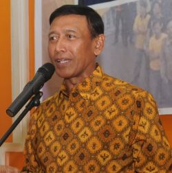 Wiranto, mantan Panglima ABRI.